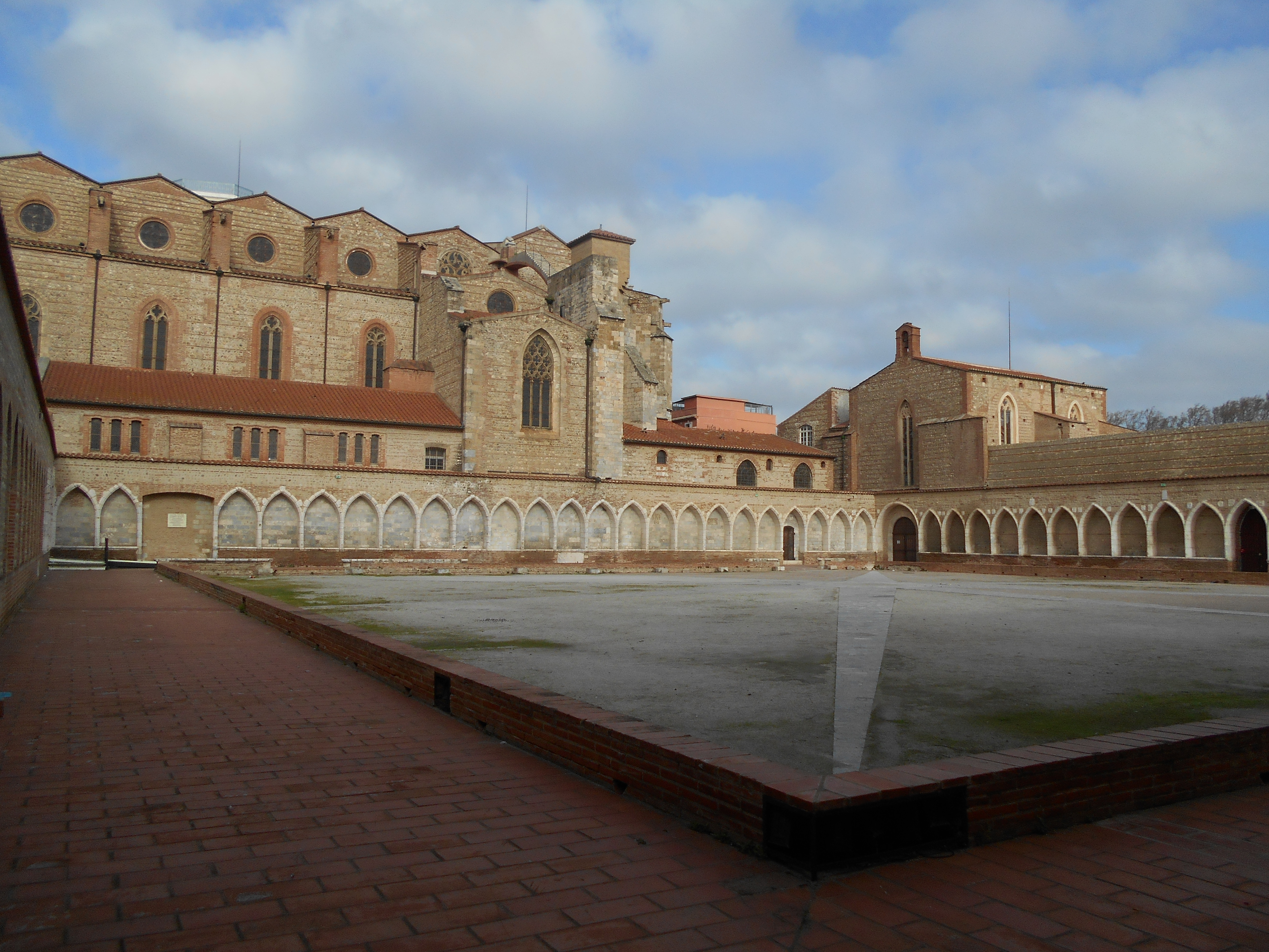 La Funerària, capella de Sant Joan Evangelista, al Campo Santo de Perpinyà